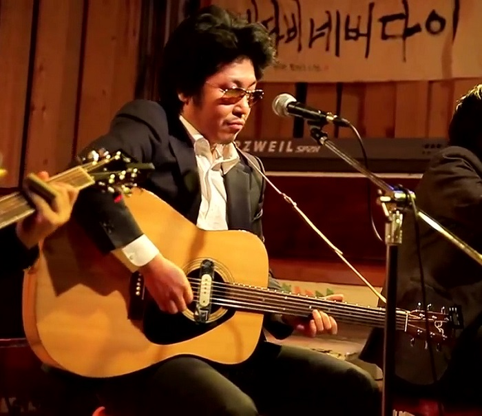 살롱바다비에서 '카페 작업 블루스'를 연주하는 대한민국의 가수 김대중